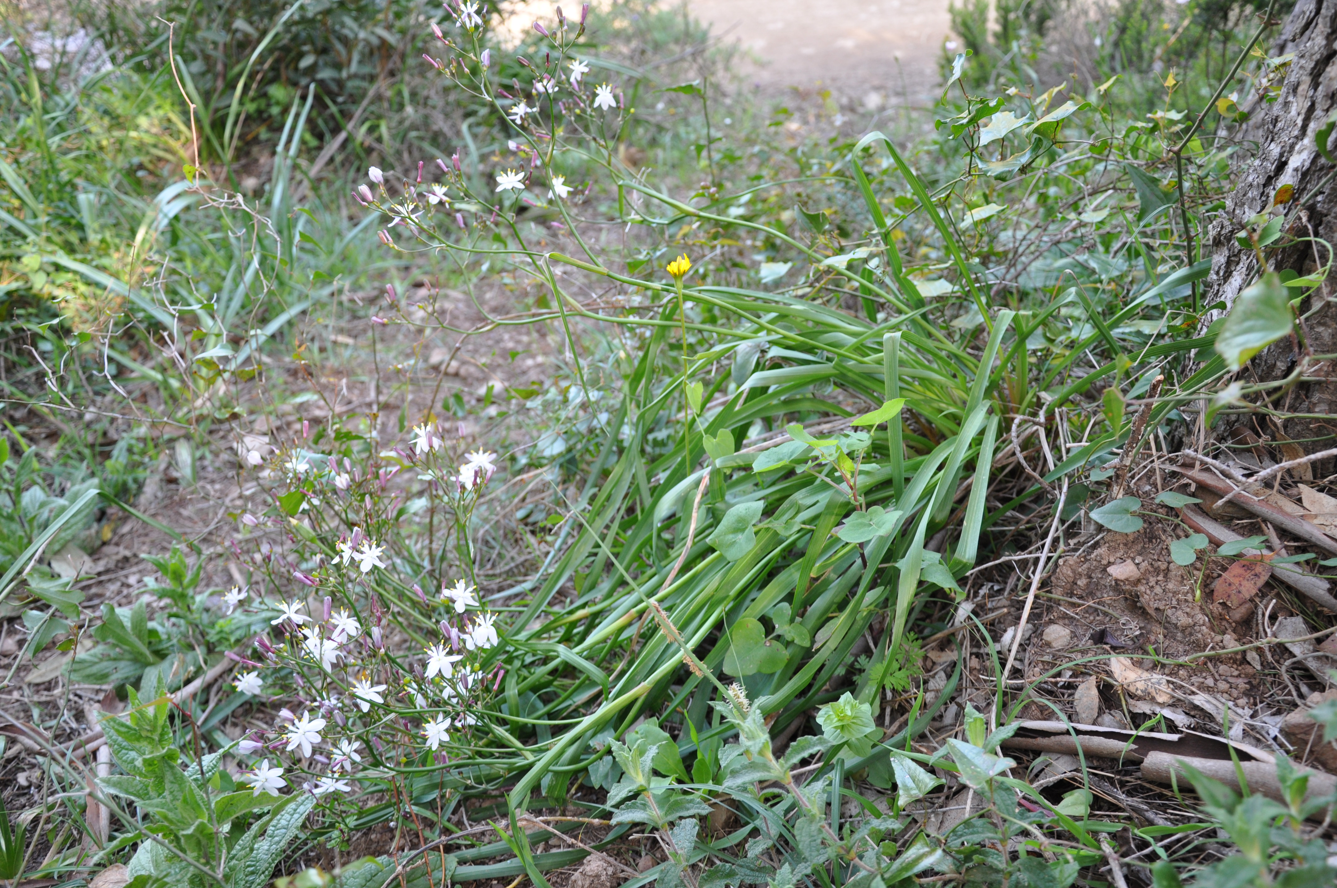 Hábito del Palomino (Simethis planifolia) Ceuta, España.